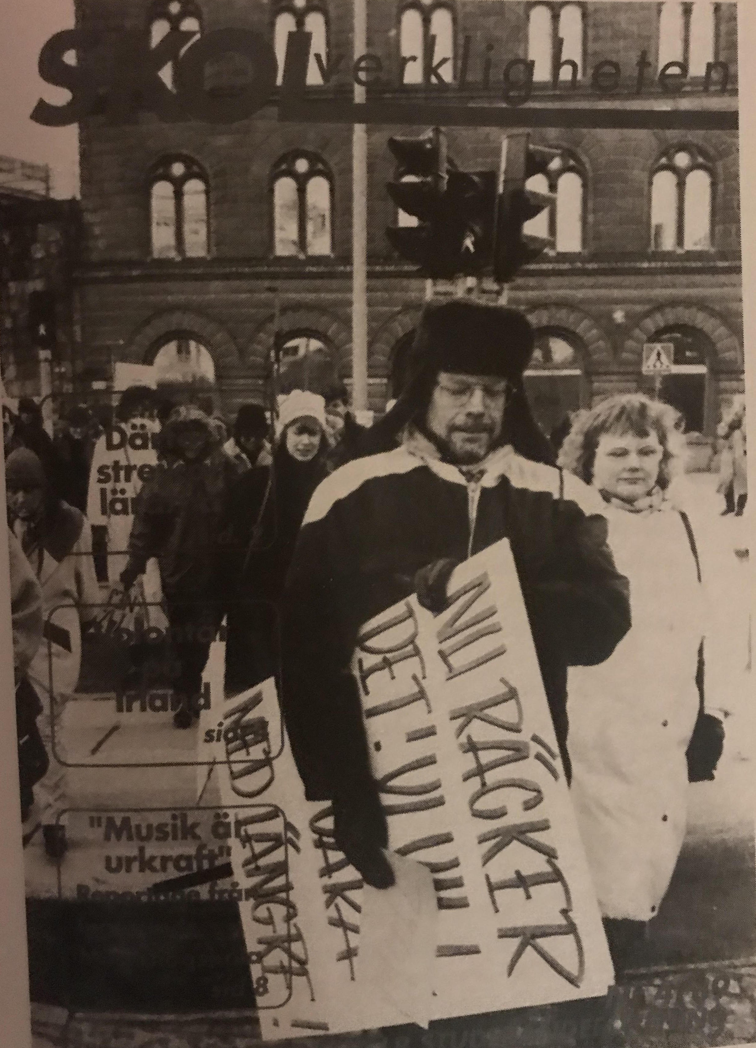 Strejkbild